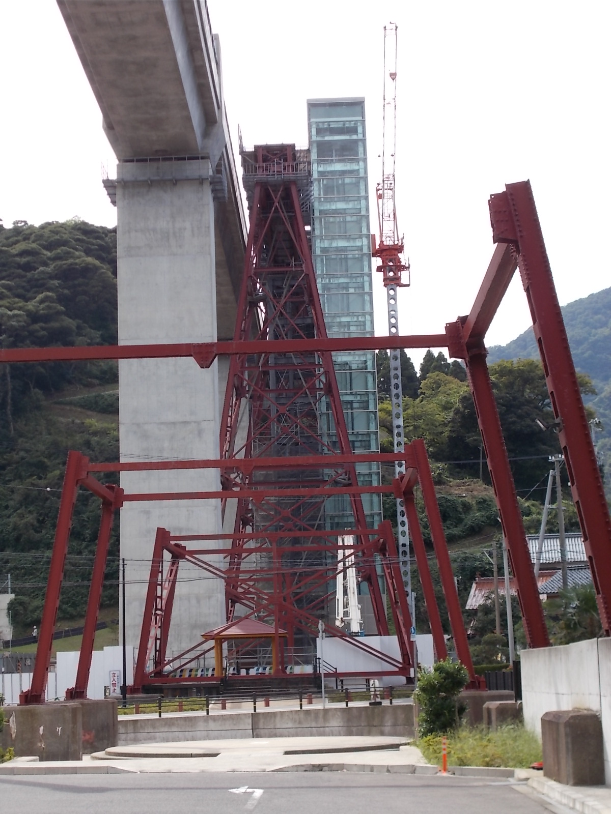 余部鉄橋「空の駅」、兵庫県香美町